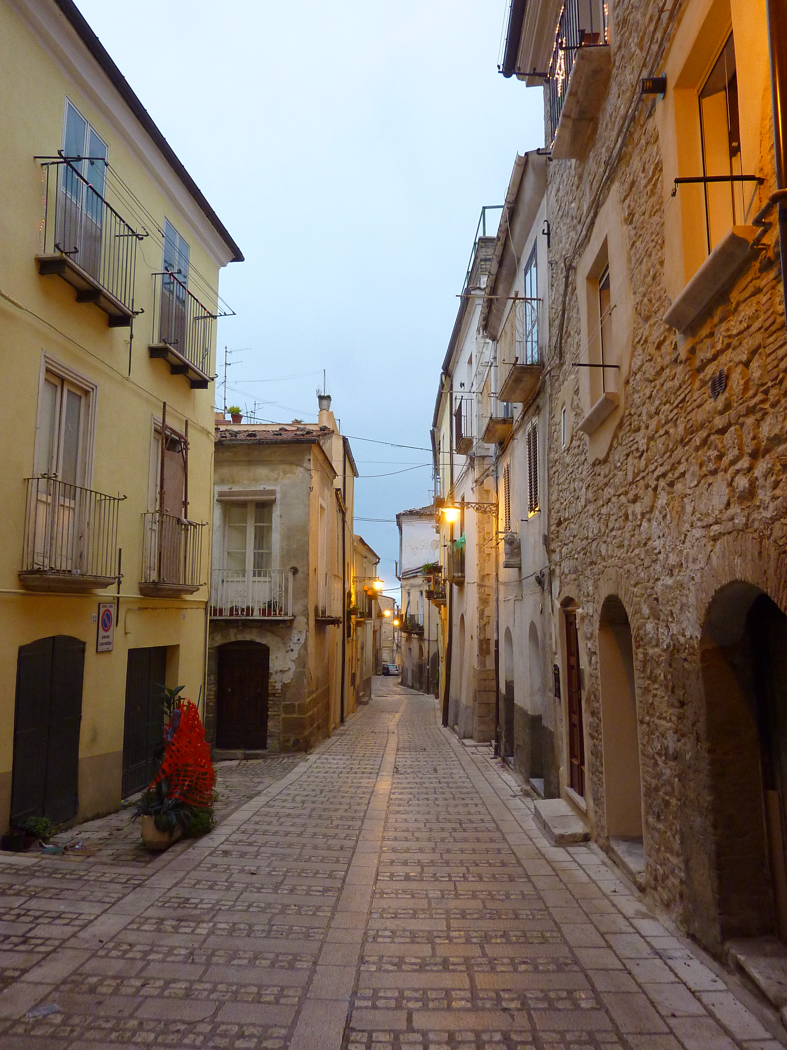 Larino